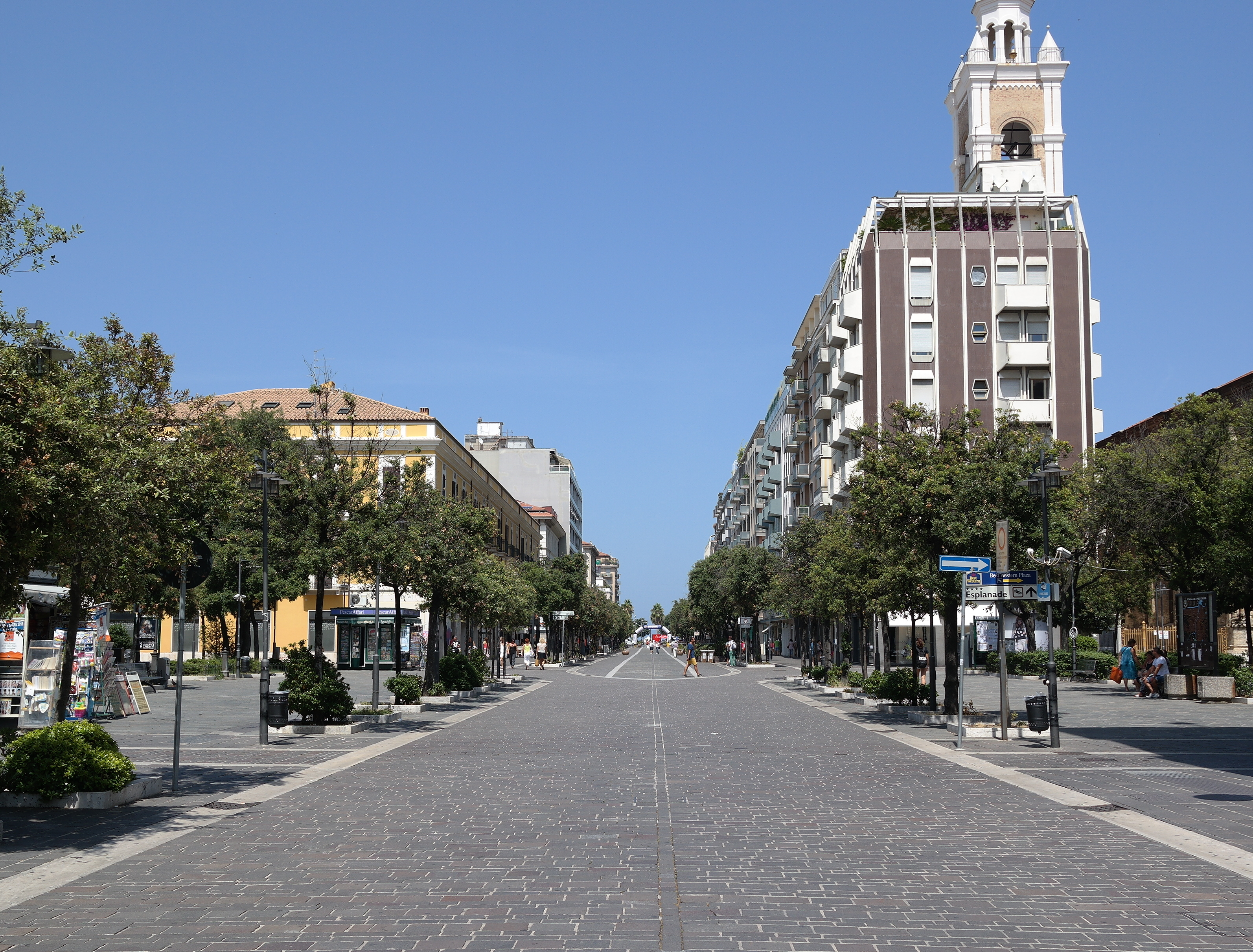 Corso Umberto I a Pescara